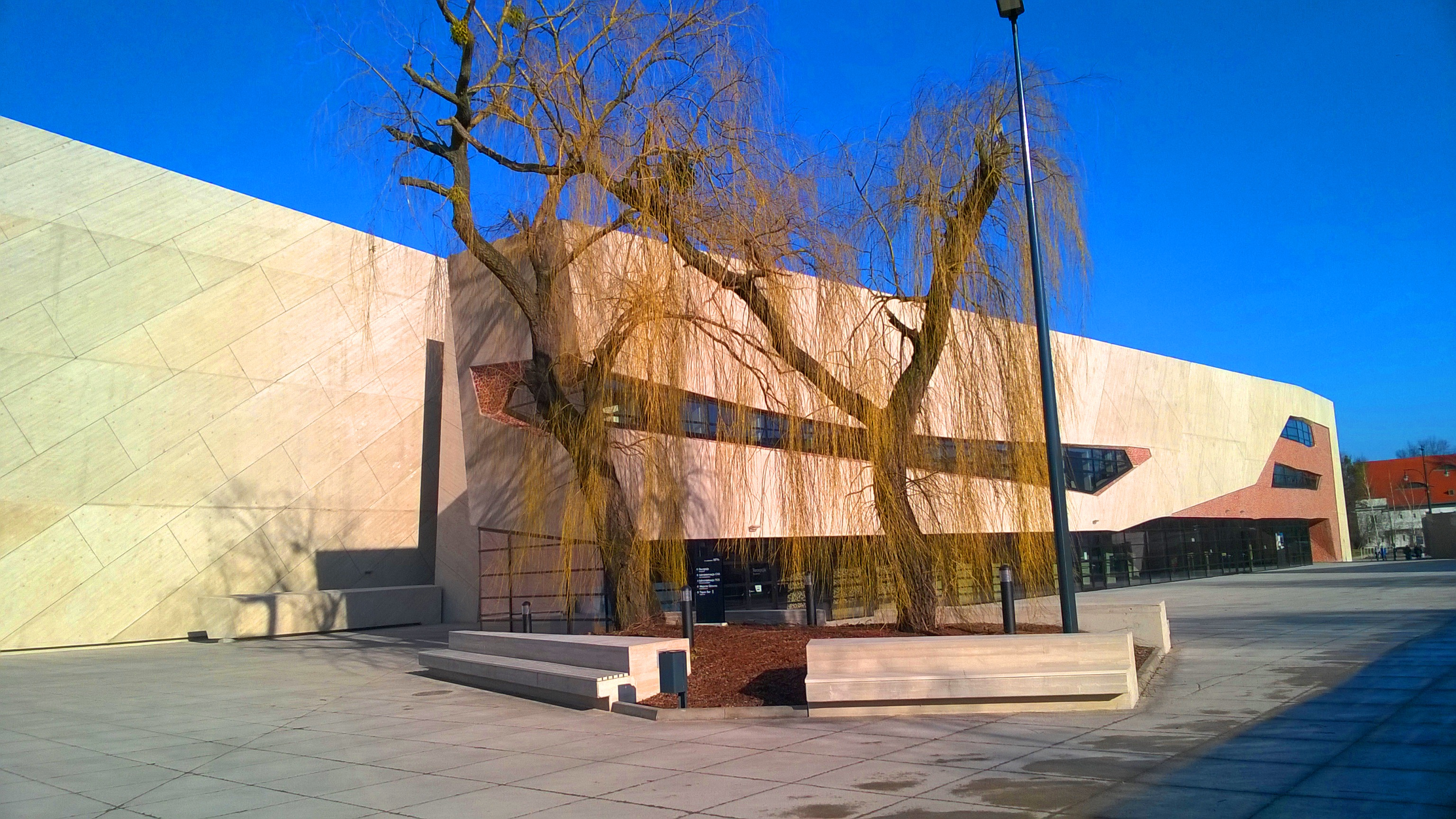 Centrum Kulturalno-Kongresowe Jordanki w Toruniu9